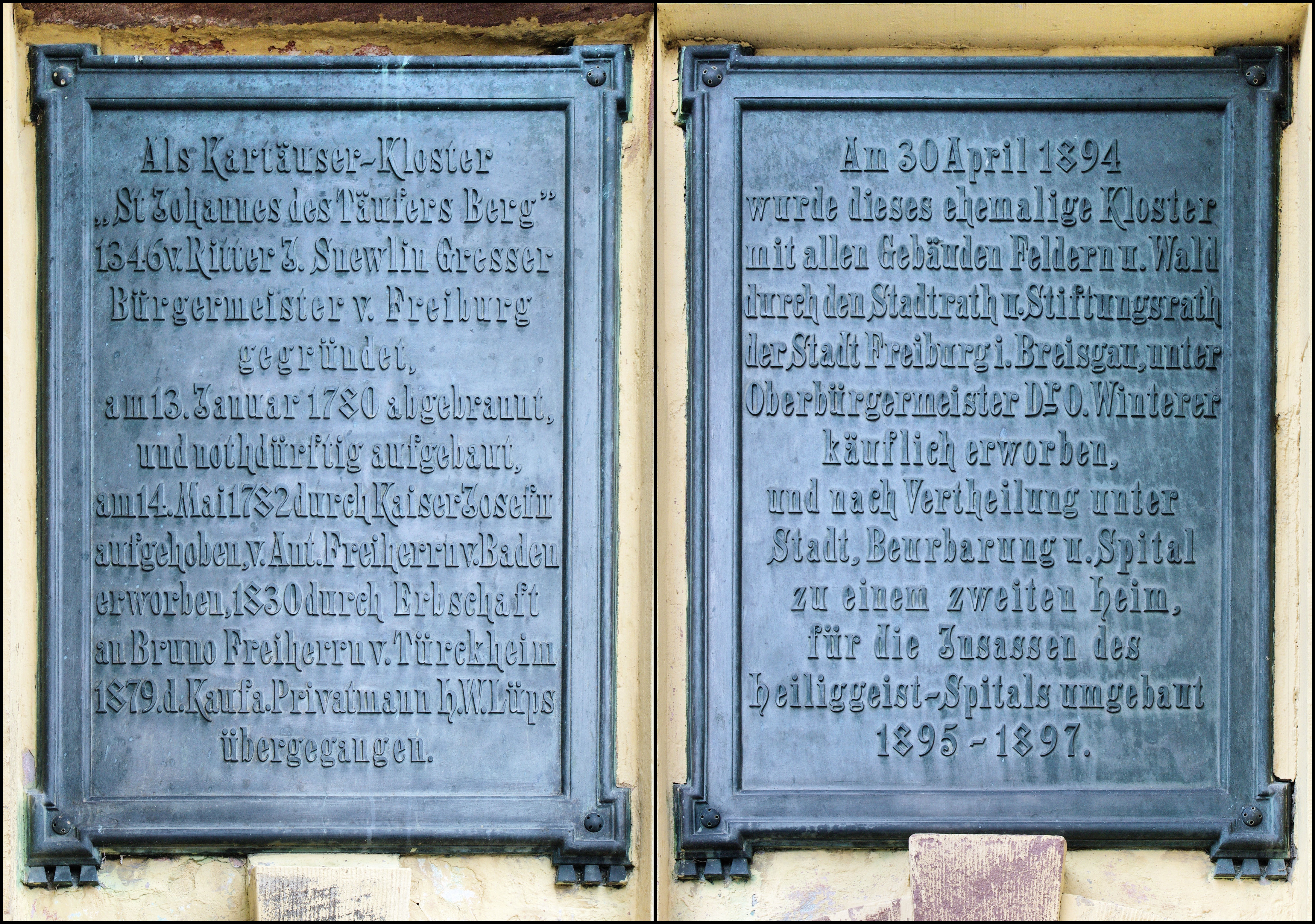 Bilder der Kartause Freiburg